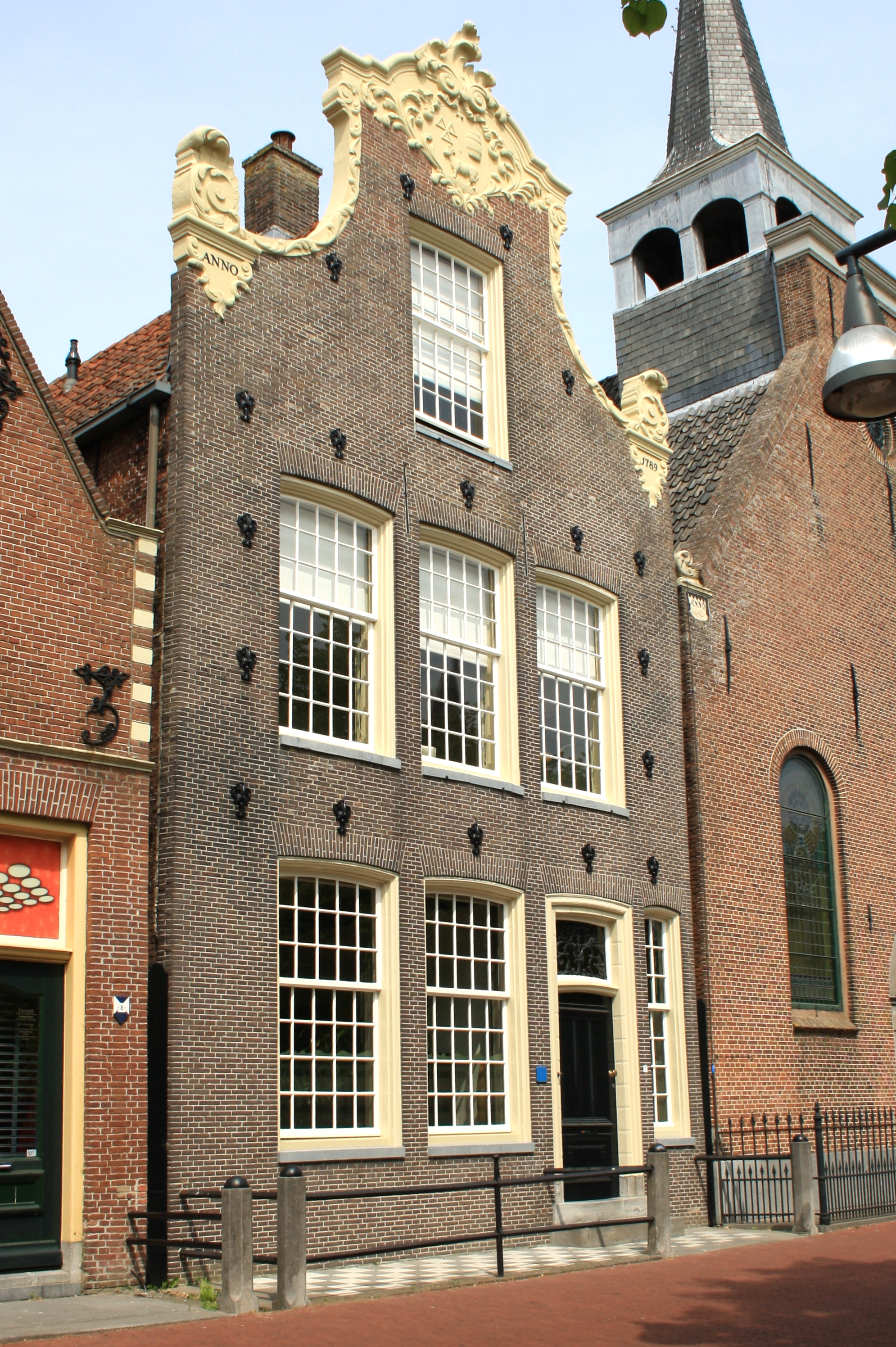 Balk - van Swinderenstraat 7 - Rijksmonument